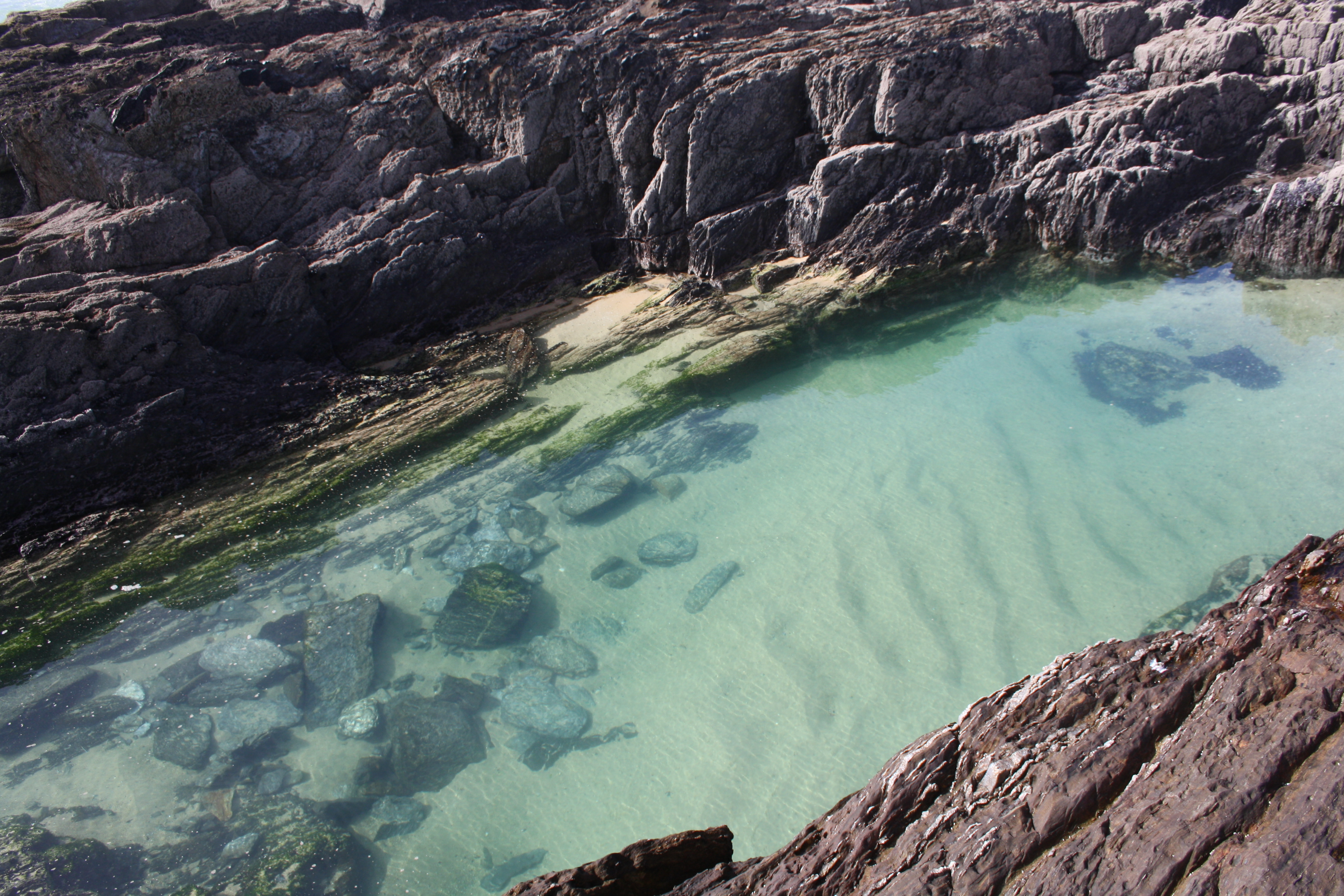 Lugar exacto donde Ramón Sampedro se lanzó al agua causándose la lesión que lo dejó tetrapléjico.